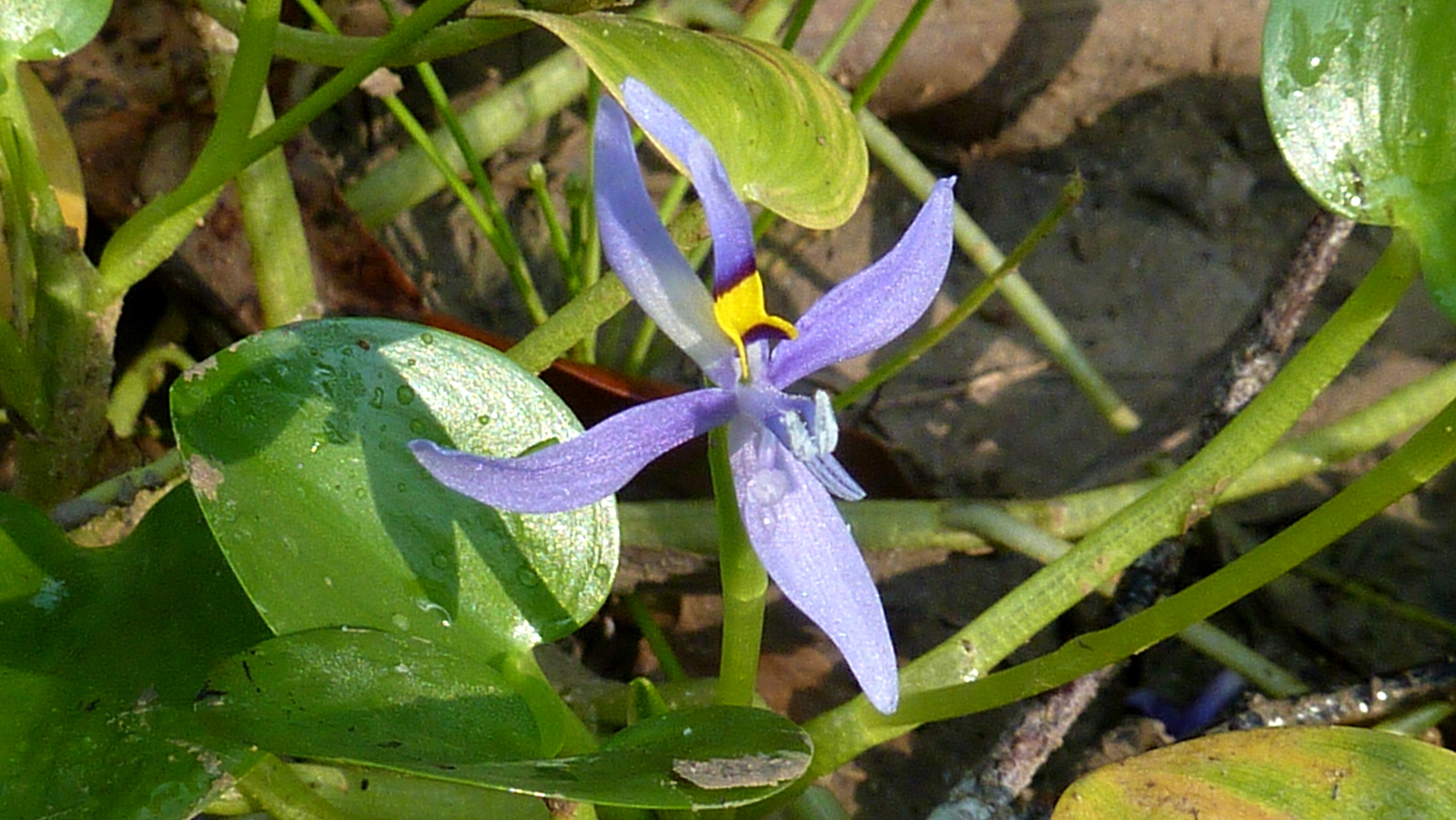 Heteranthera limosa Vahl